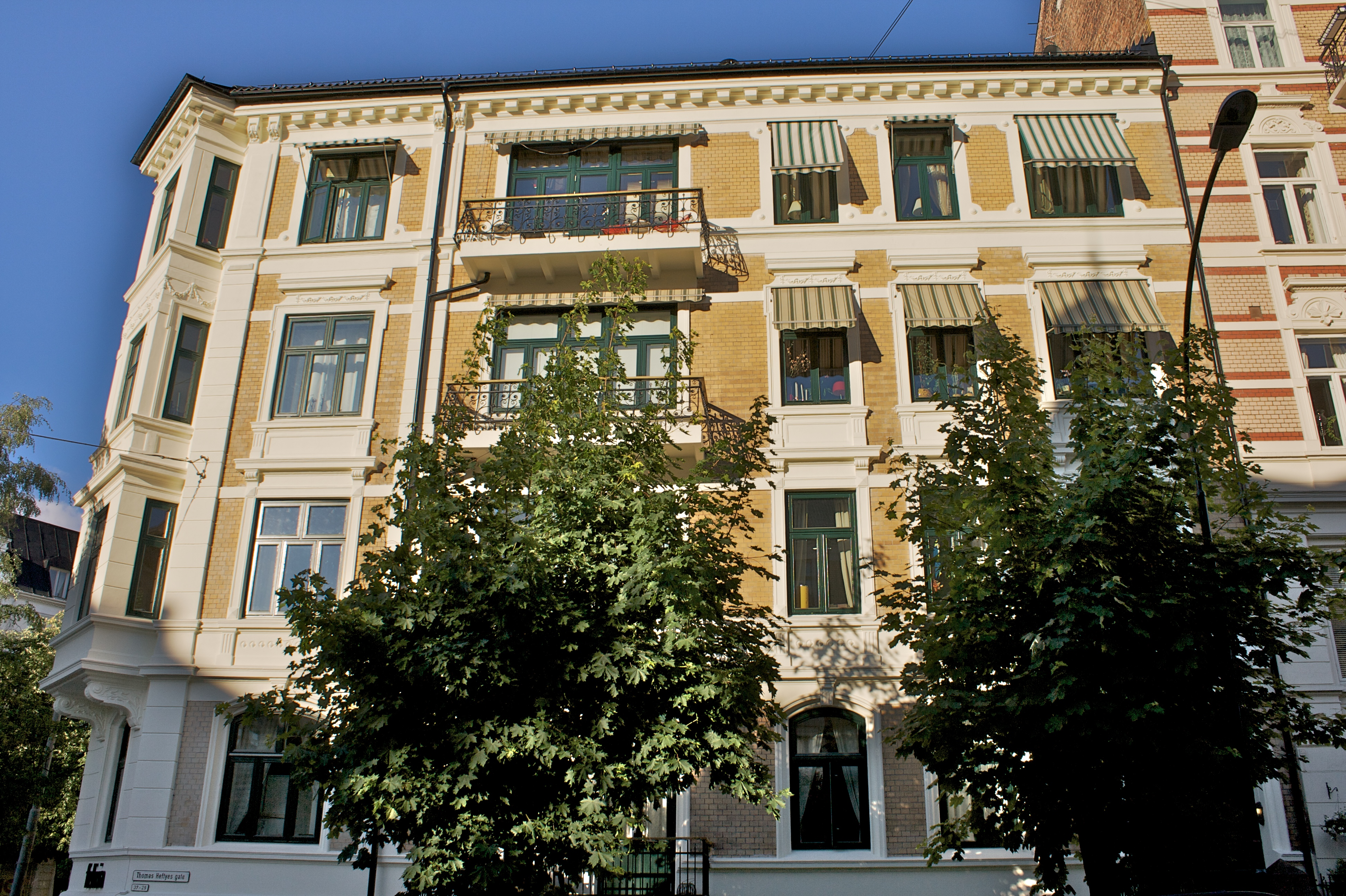 Elisenbergveien 11 på Frogner i Oslo, sett fra Thomas Heftyes gate.